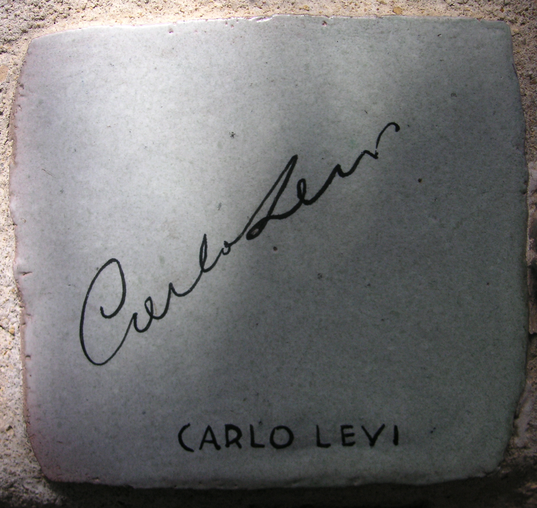 Piastrella autografata da Carlo Levi sul muretto di Alassio